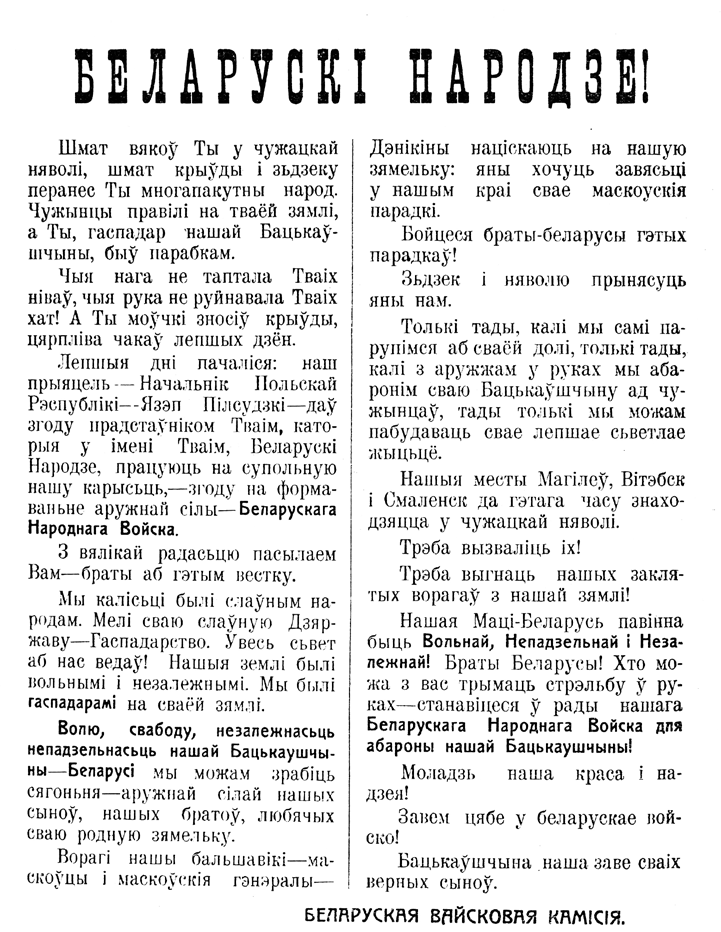 Odezwa Białoruskiej Komisji Wojskowej Беларуская (тарашкевіца): Адозва Беларускай вайсковай камісіі да народу